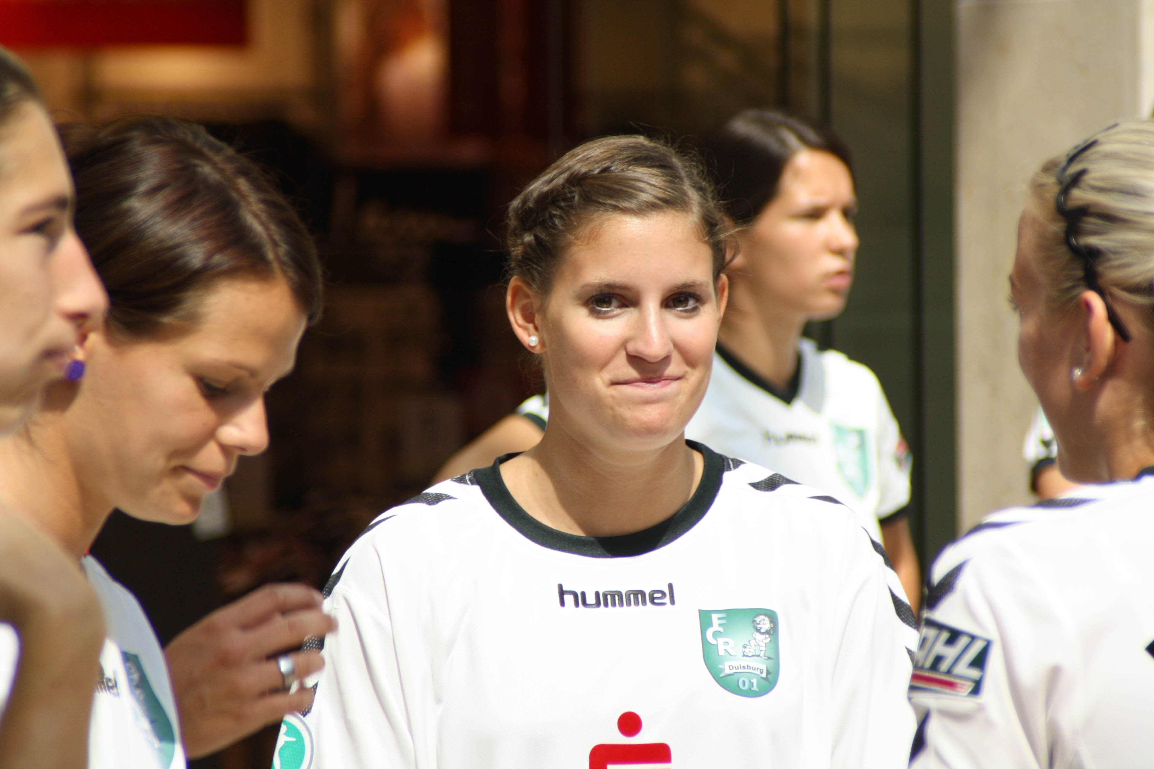 Irina London Weitere Bilder zum FCR01 Duisburg unter